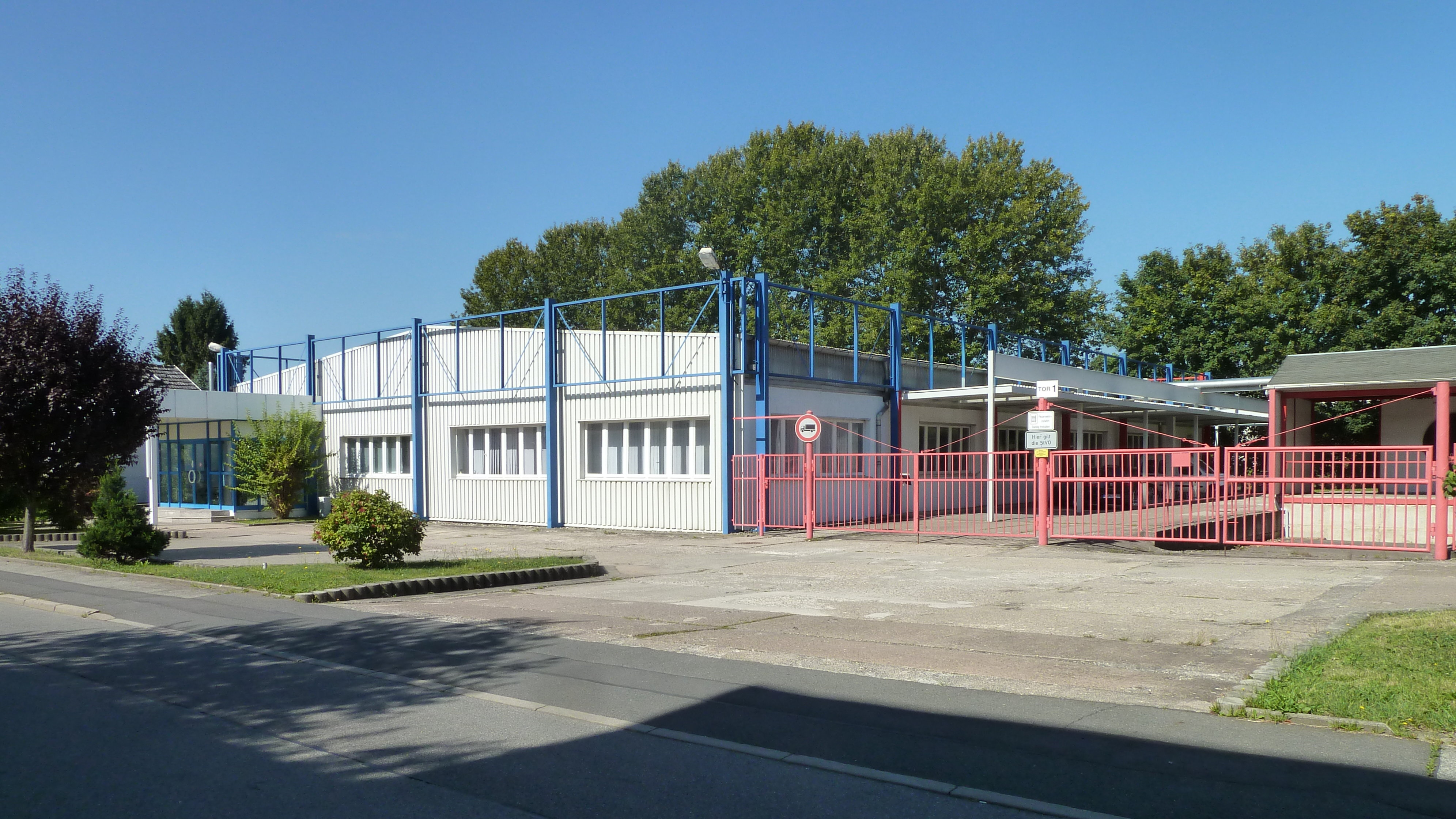 PIKO in Lutherstraße 30 in Oberlind, OT von Sonneberg, Thüringen